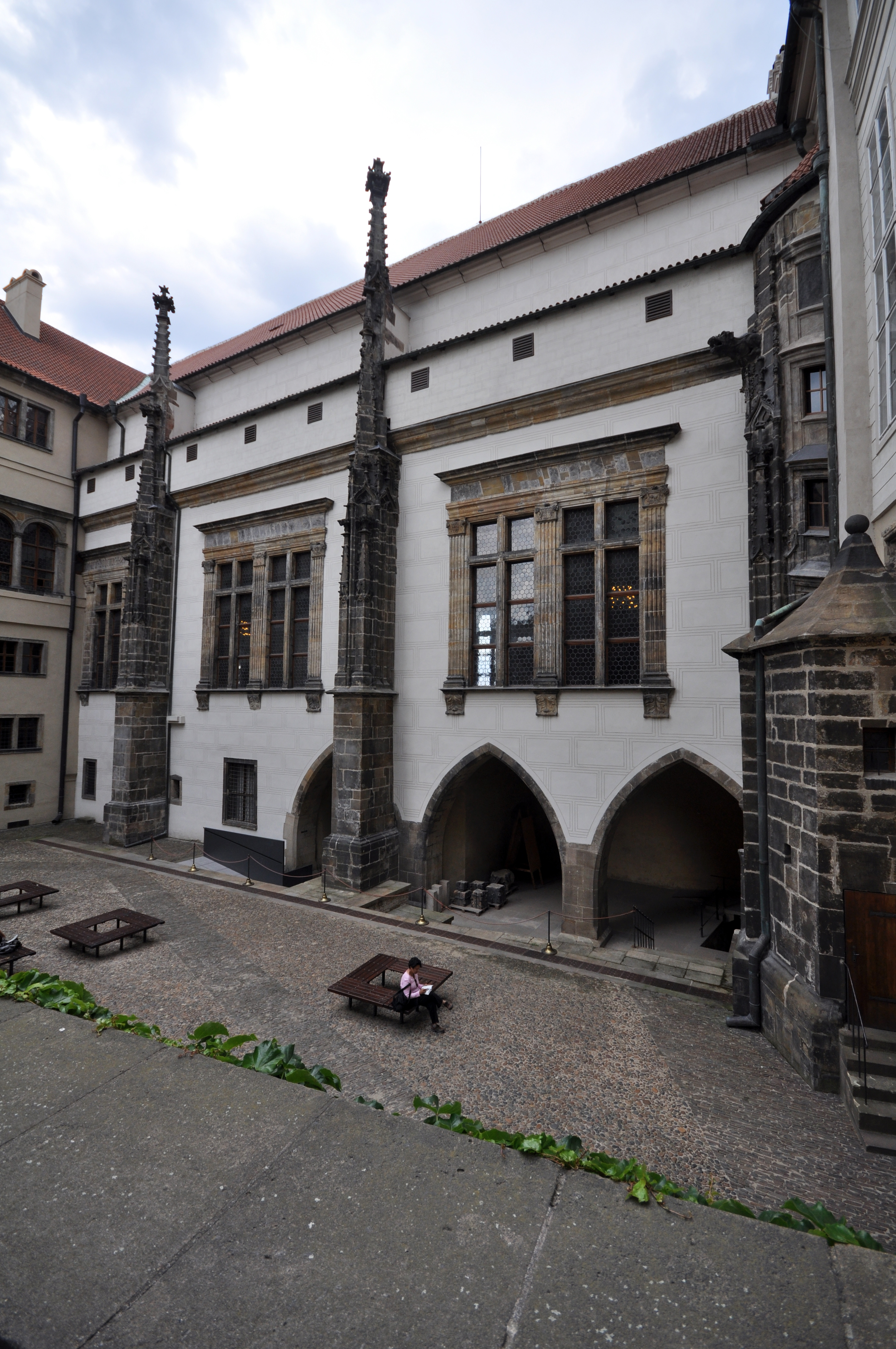 Prag